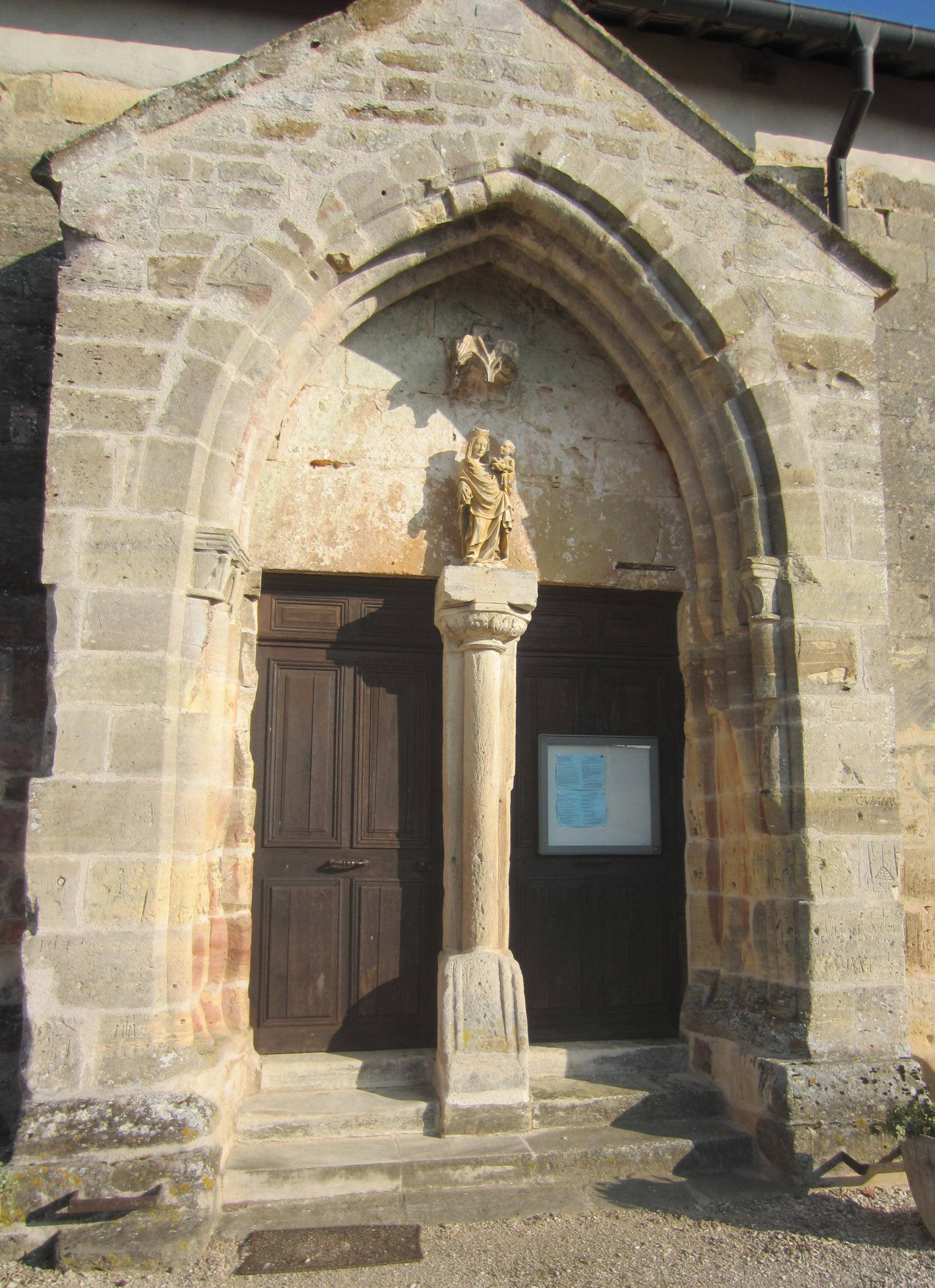 Entrée gothique ornée d'une statuette donnant sur la partie principale du cimetière; c'est l'entrée des paroissiens.